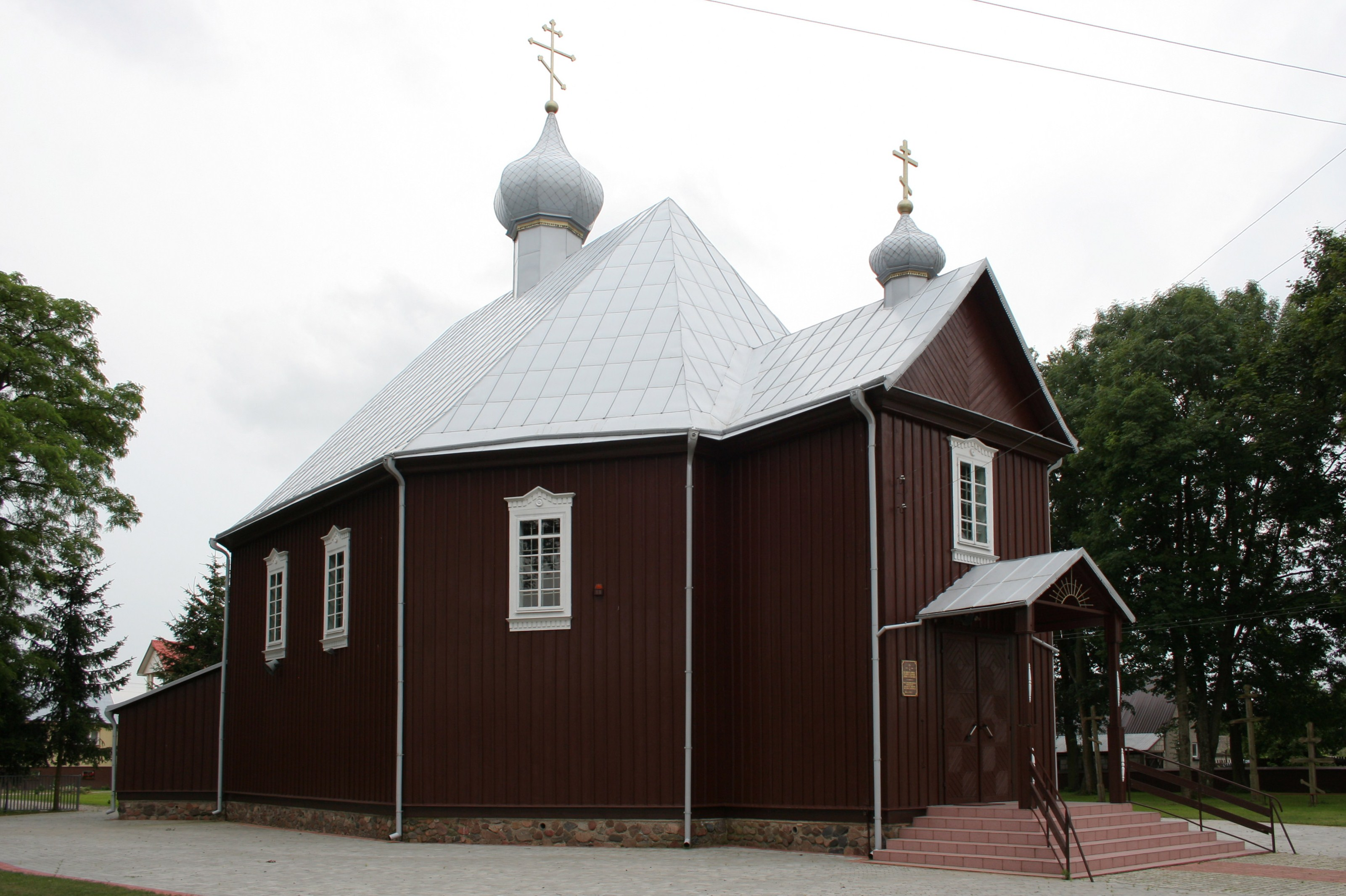 Cerkiew św. Michała w Orli.